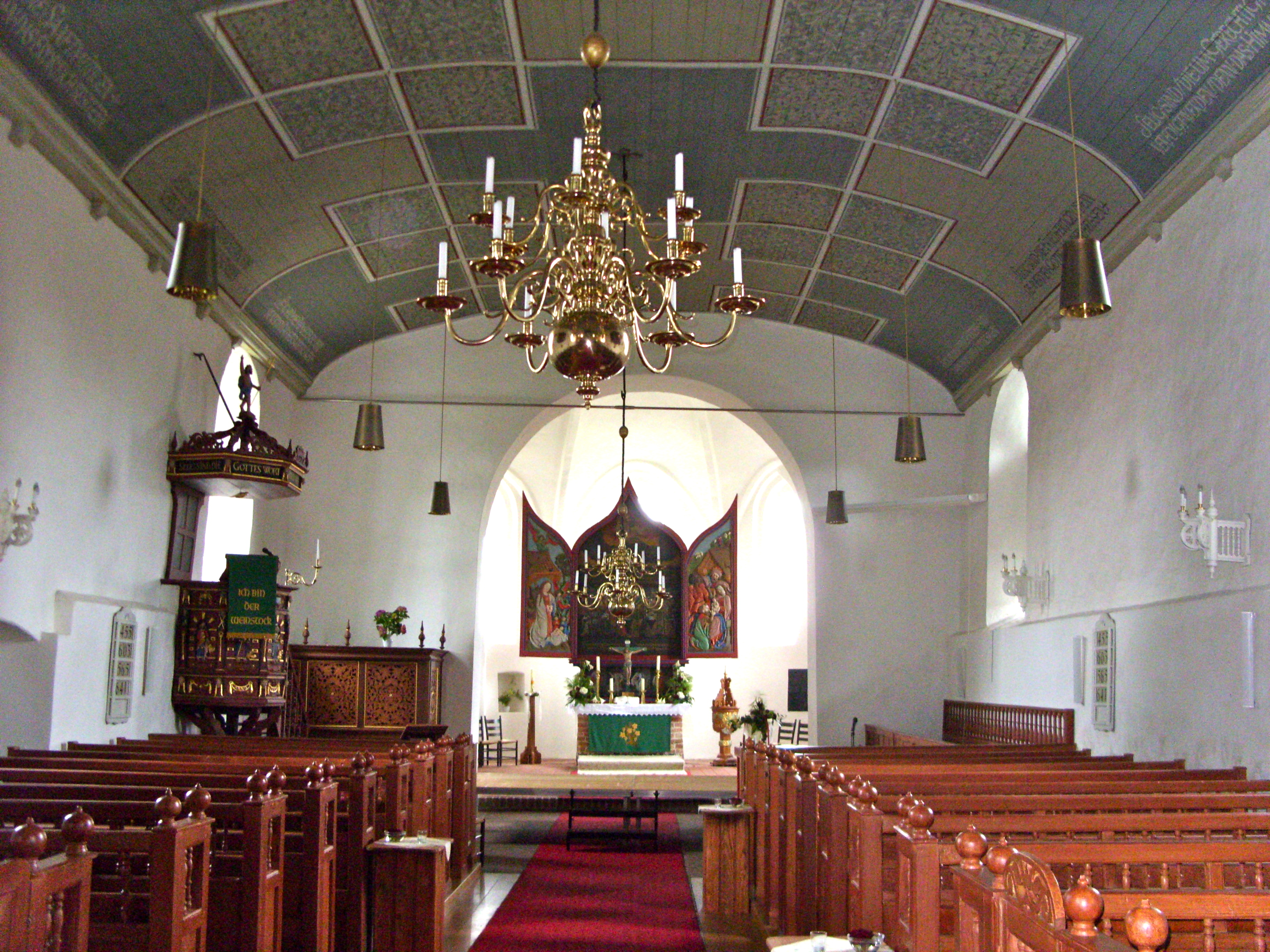 Filsum, Ostfriesland, Kirche